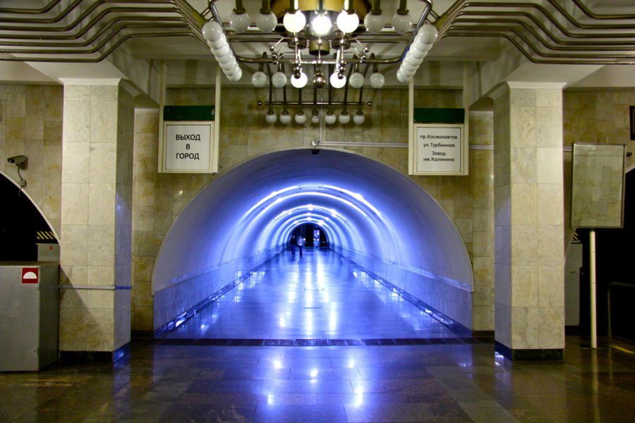 Yekaterinburg Metro (Екатеринбургский метрополитен)